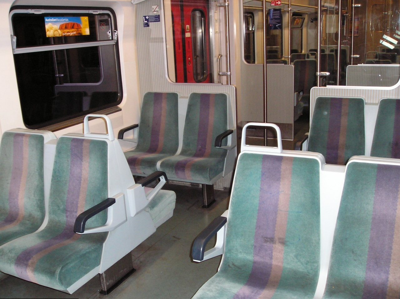 Weitgehend im Originalzustand: Inneneinrichtung des am 18.08.1995 in Betrieb genommenen 50 80 80-33 193-9.